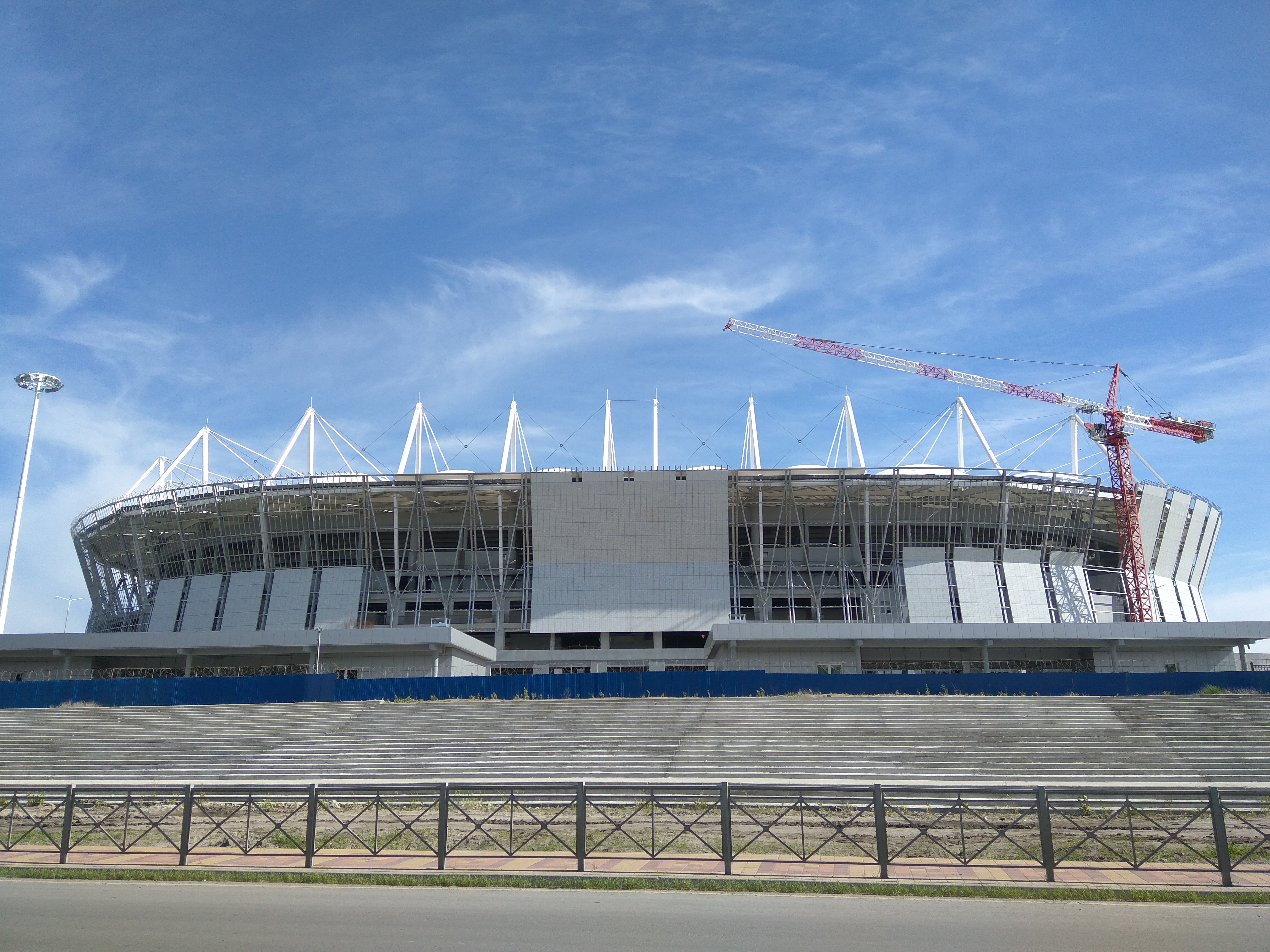 вид на строящийся стадион "Ростов-Арена" 21 мая 2017